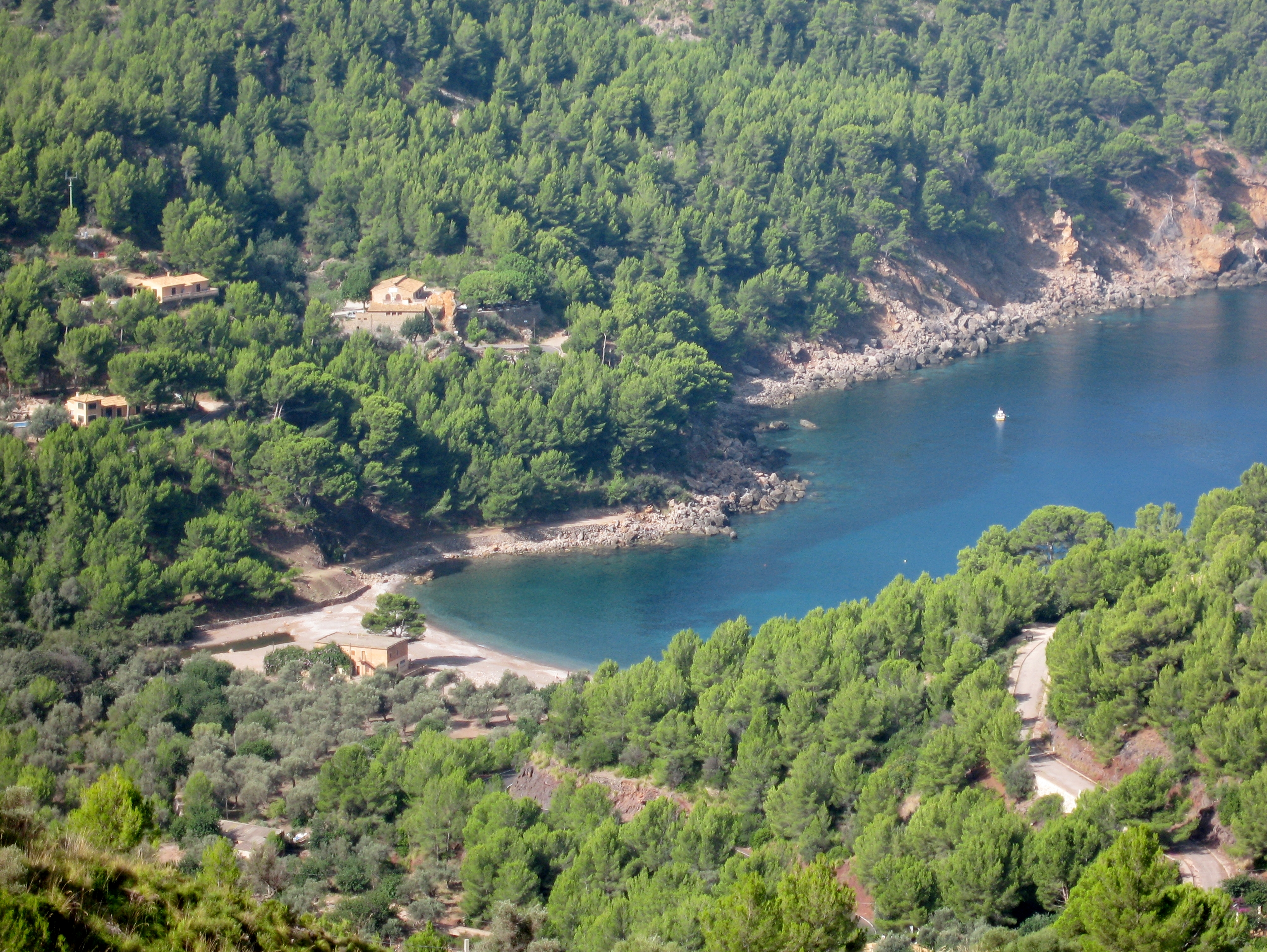 Cala Tuent, Escorca, Mallorca, Spain